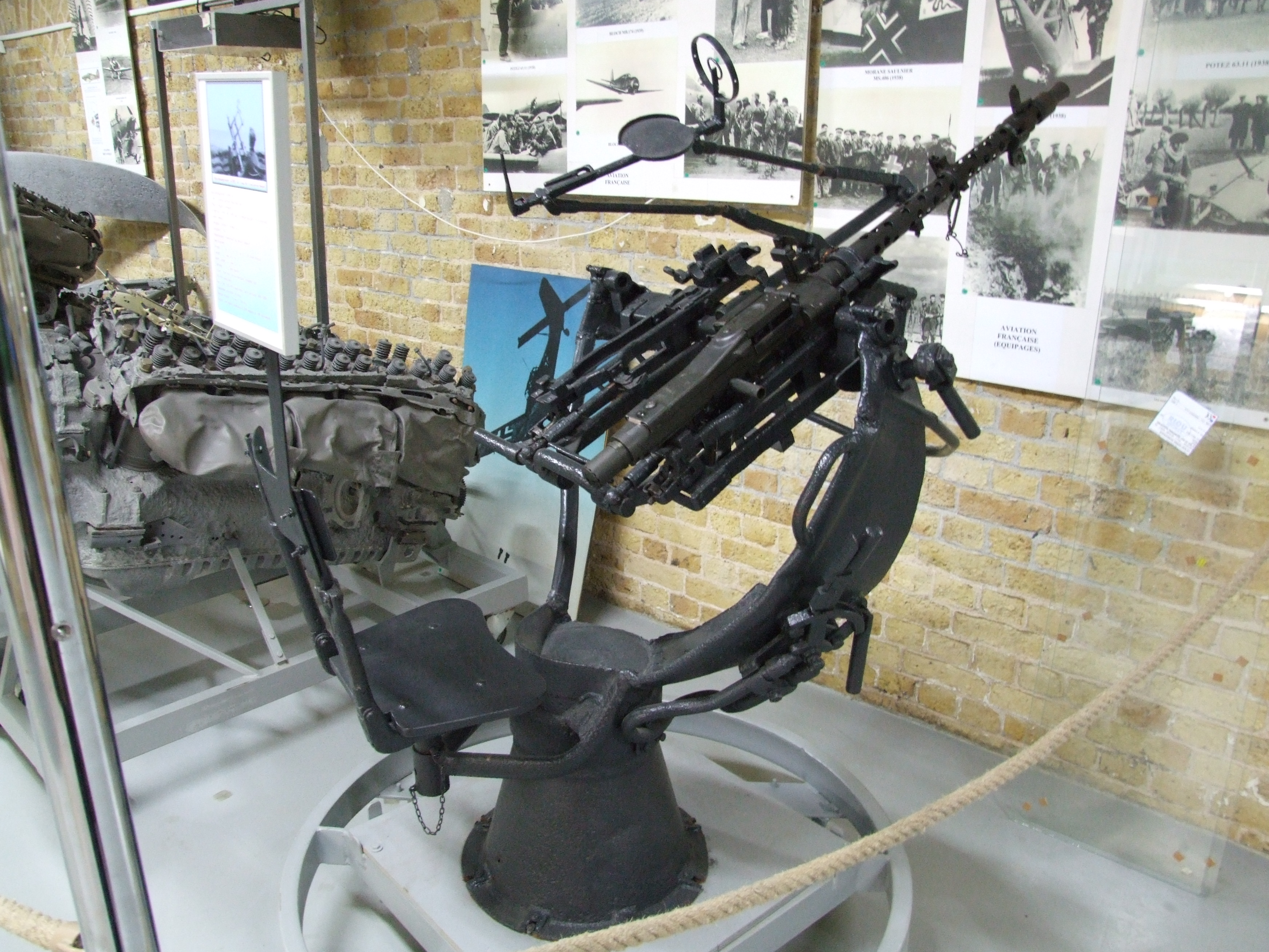 Maschinengewehr 34 (MG 34) auf Flugabwehrlafette, Mémorial du Souvenir, Dünkirchen